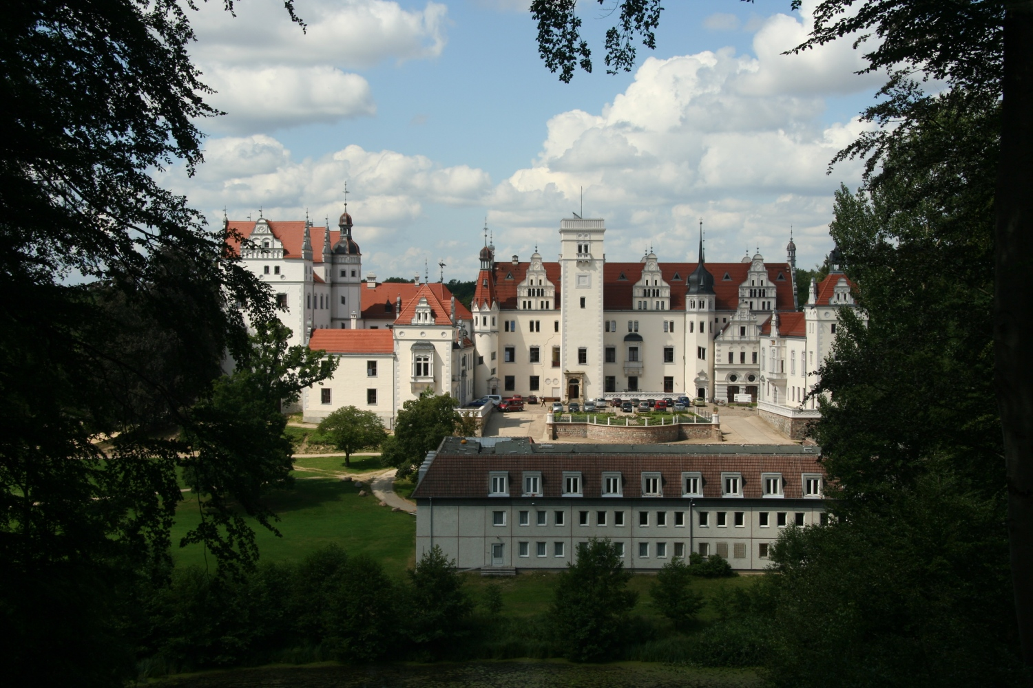 Schloss Boitzenburg